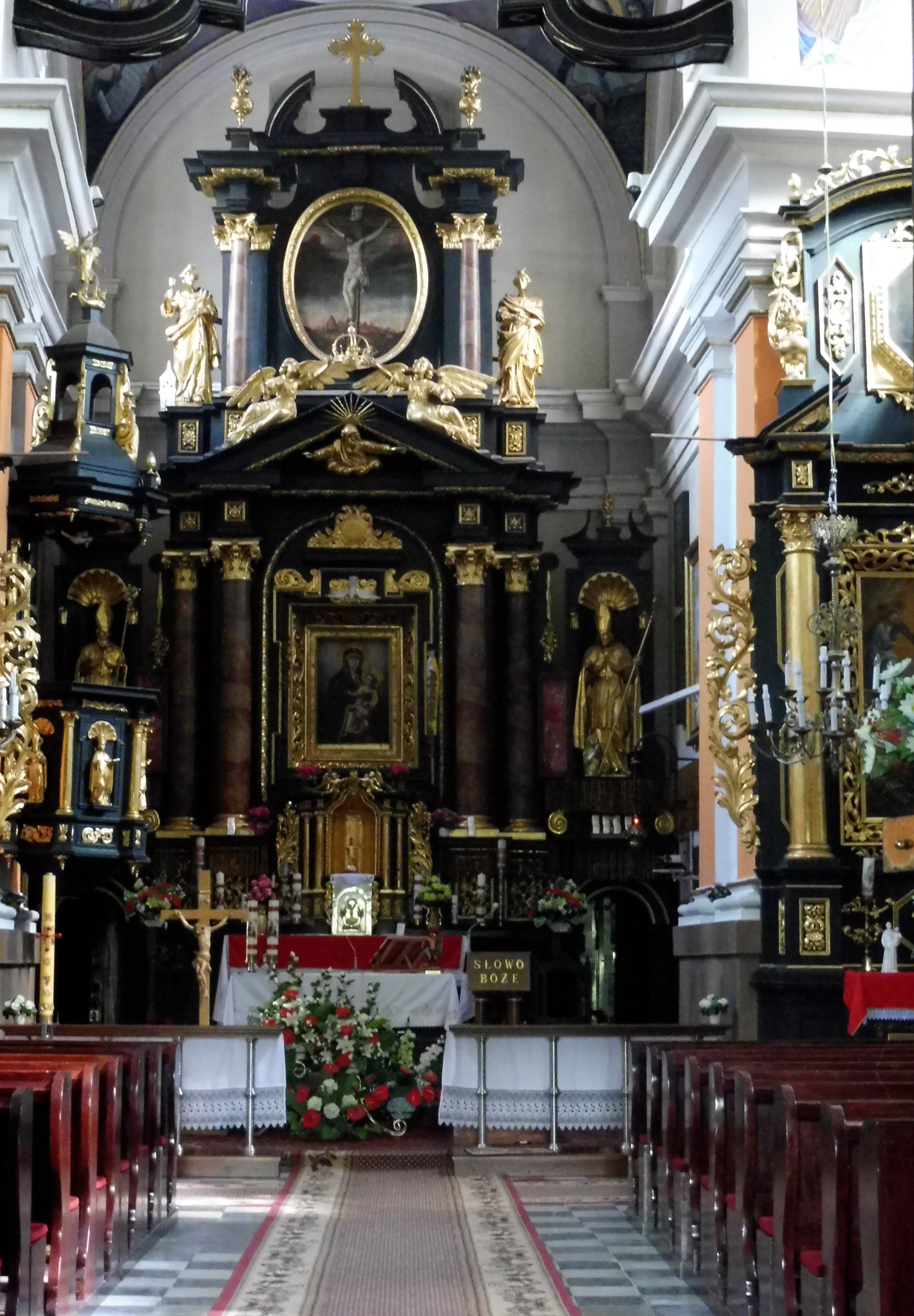 Zielenice - rzymskokatolicki kościół parafialny pw. NMP Niepokalanie Poczętej, 1681-1691